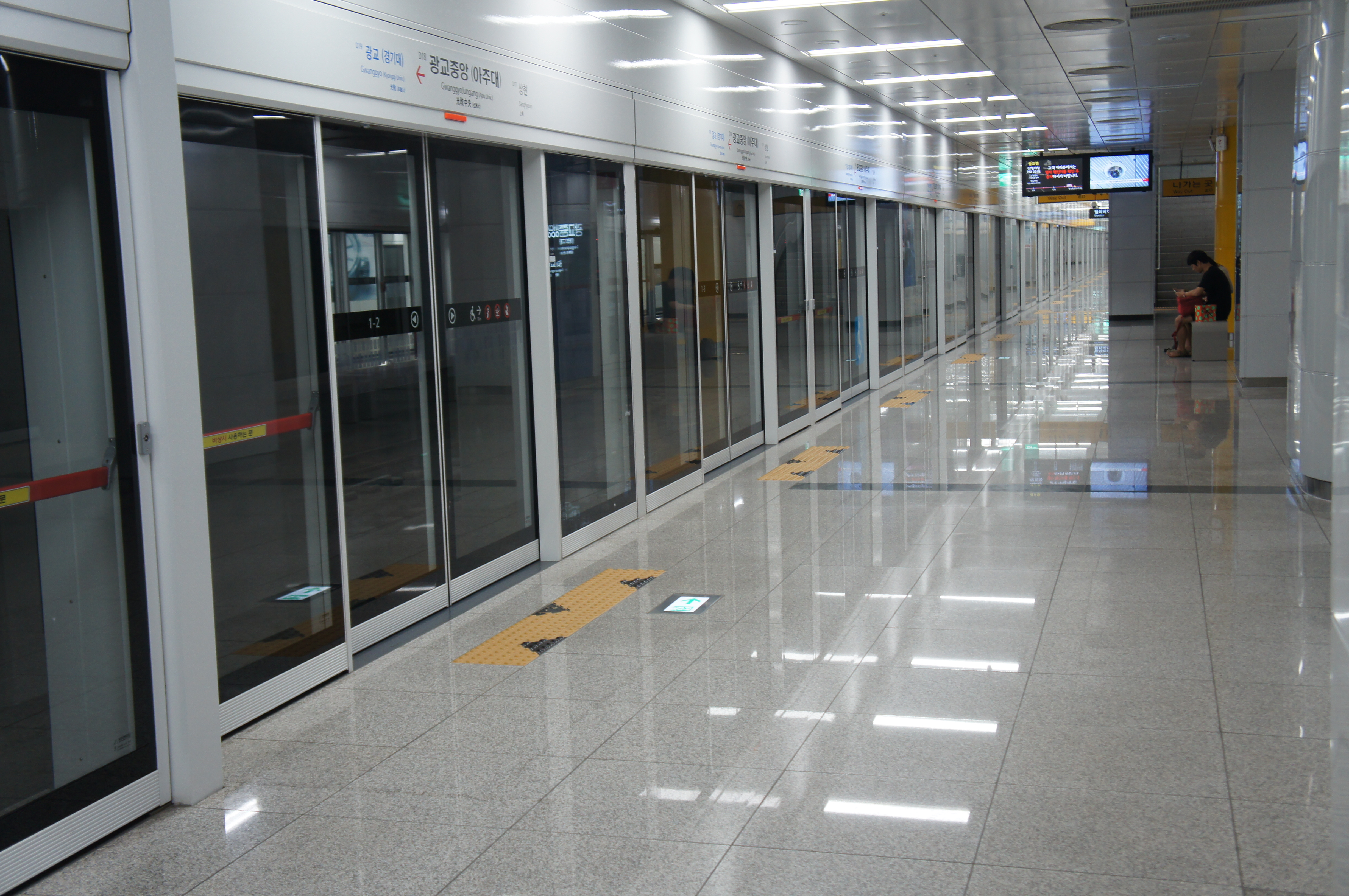 광교중앙역 승강장